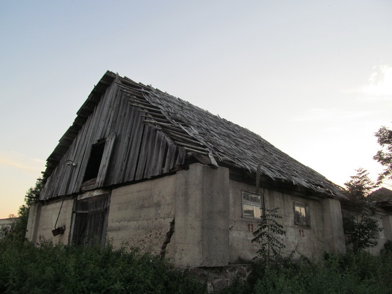 Дварышча. Гаспадарчая пабудова